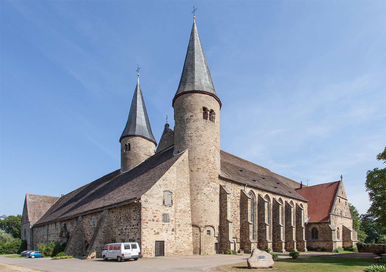 Kloster Möllenbeck, Gesamtansicht von Südwesten This is the photograph of an architectural monument. It is part of the list of cultural monuments of Rinteln